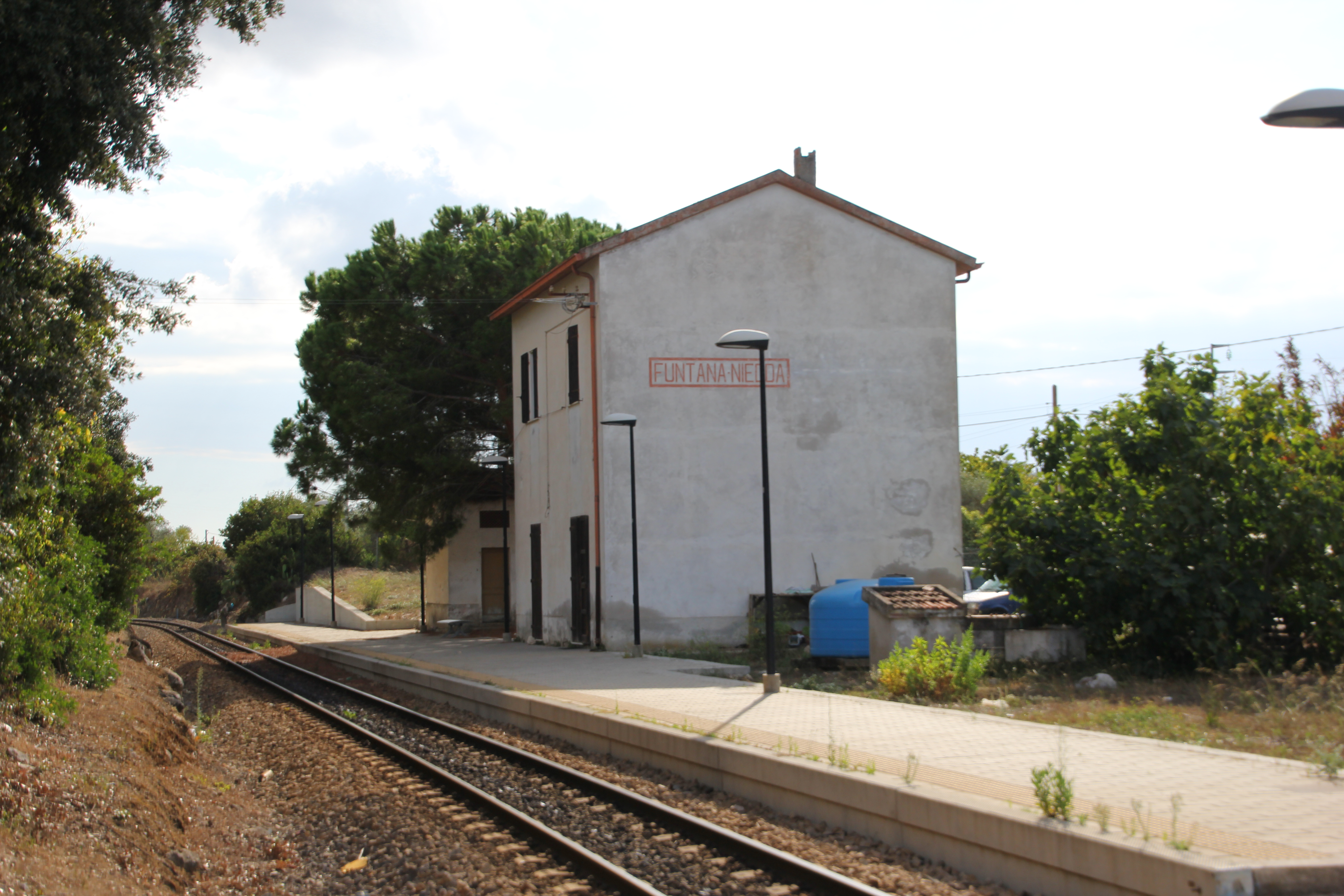 Sorso - Stazione di Funtana Niedda - Ferrovia Sassari-Sorso